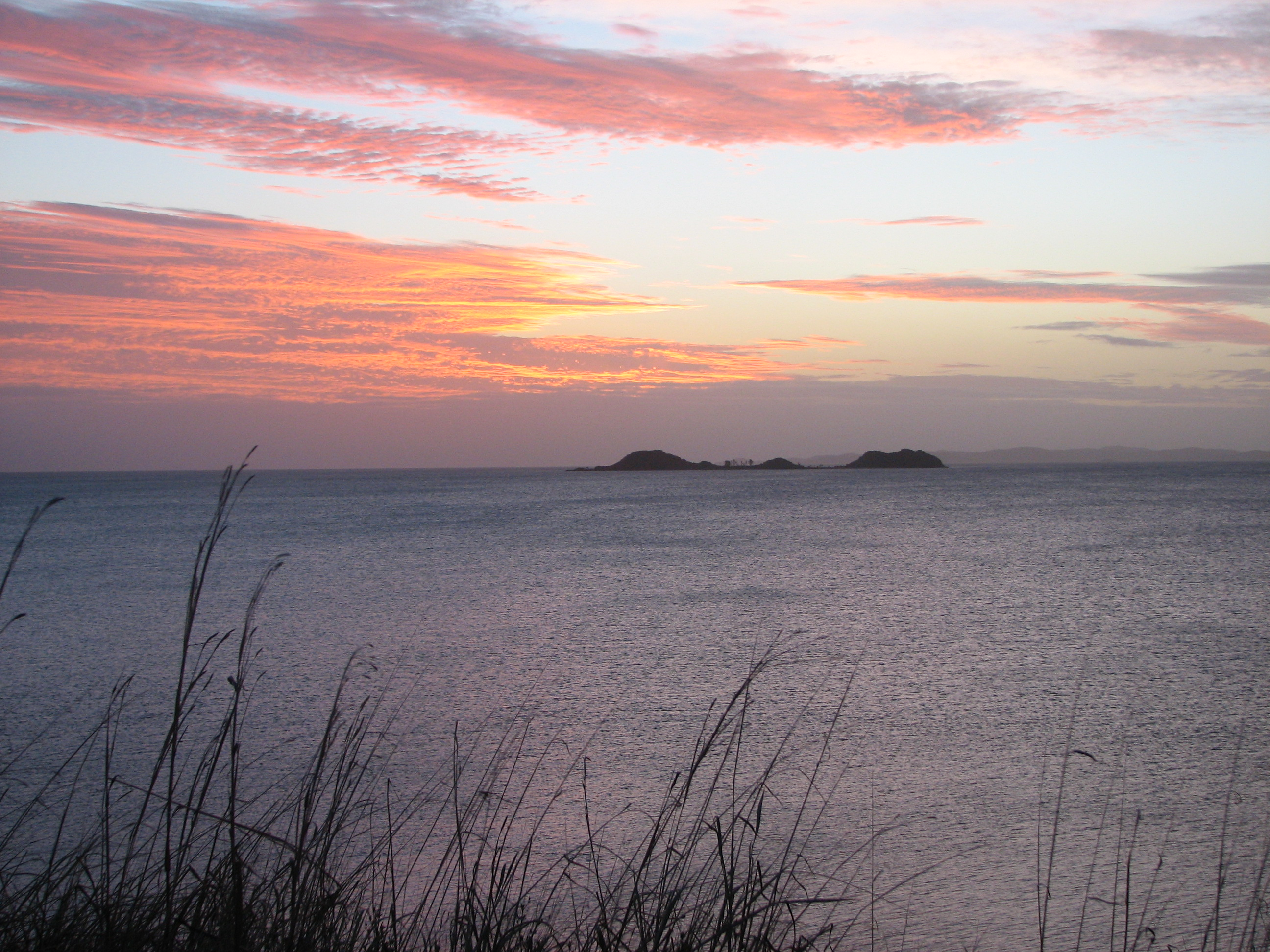 Umagico QLD 4876, Australia